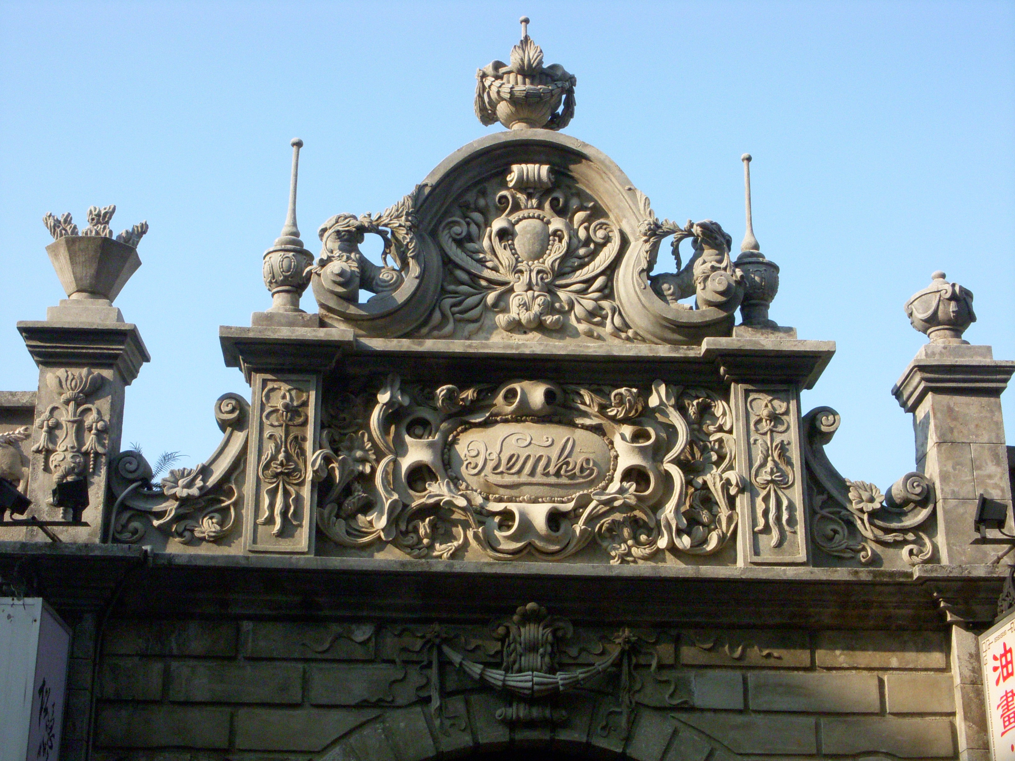 臺灣桃園大溪老街街屋山牆